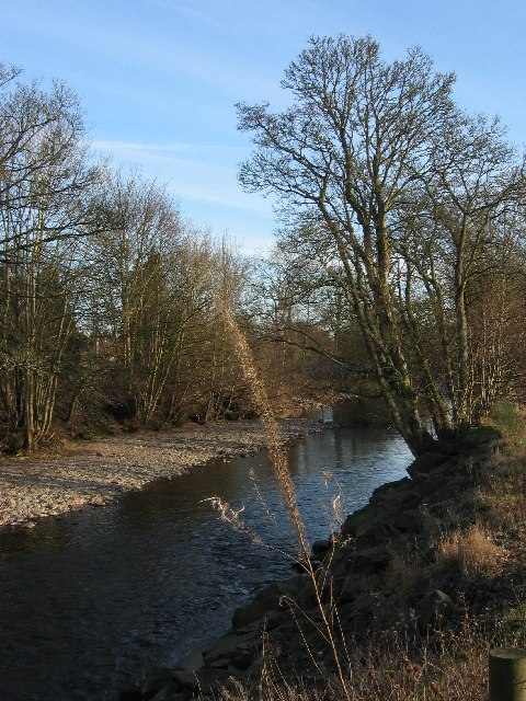 River Almond at Almondbank